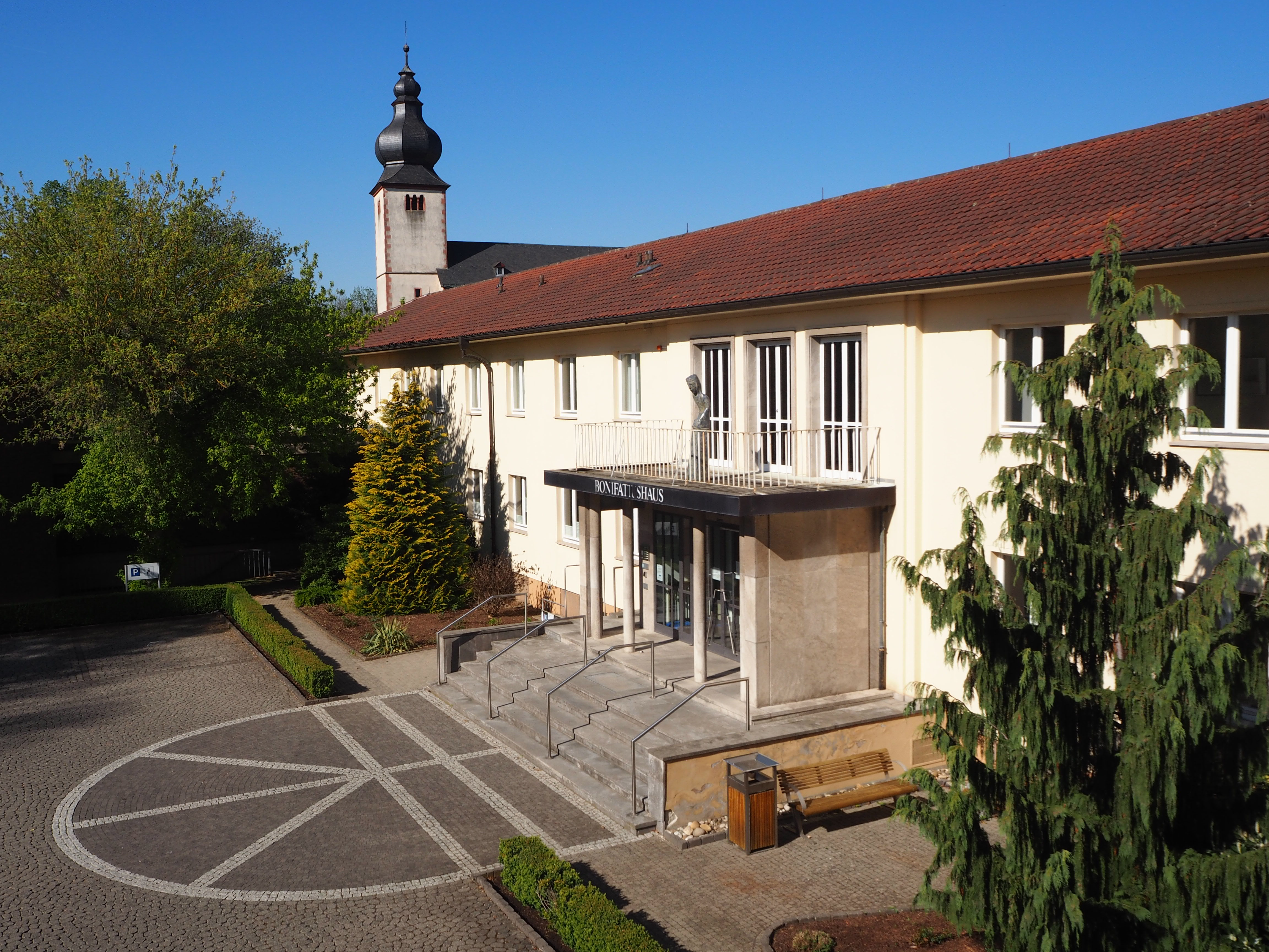 Das Bonifatiushaus in Fulda (Frontansicht).